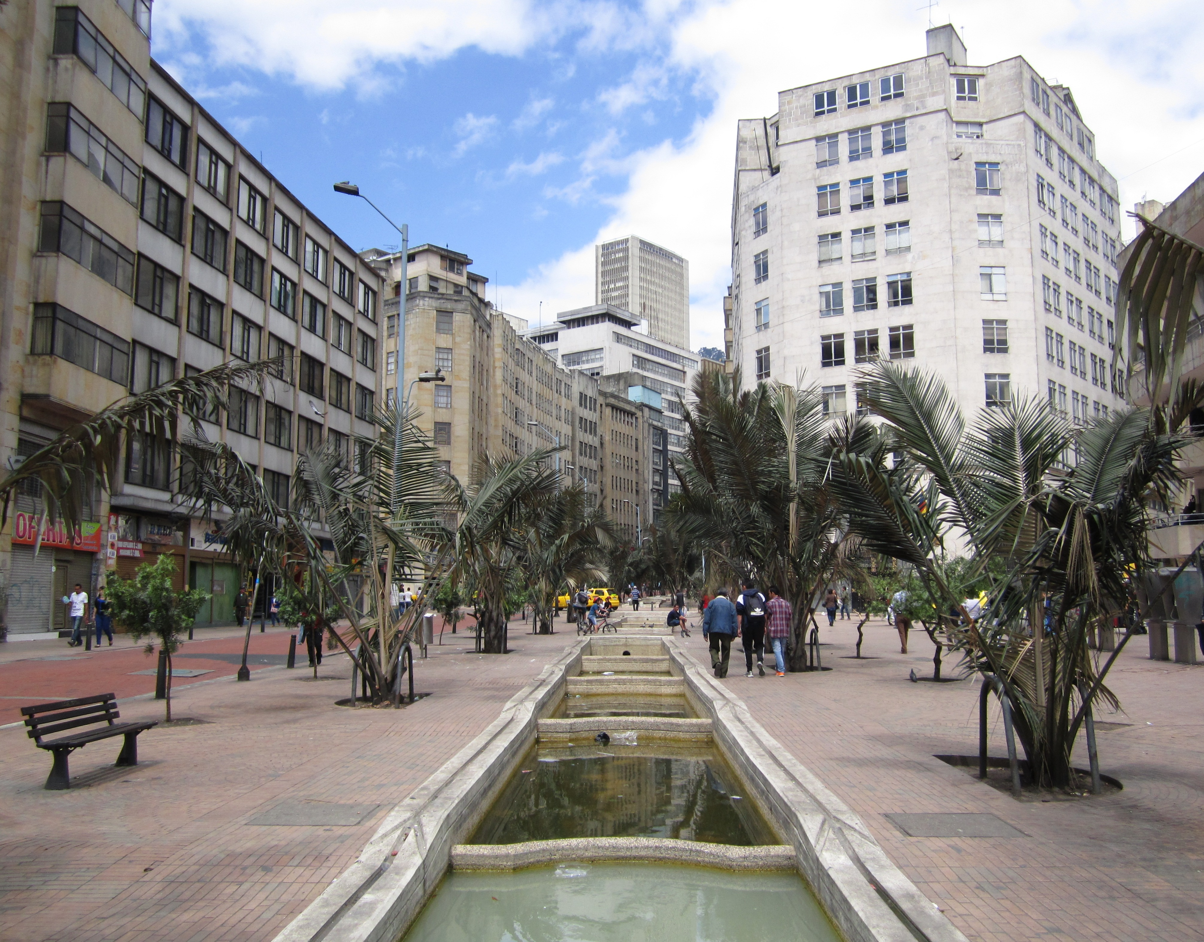 Avenida Jiménez Eje Ambiental, carrera 9. Localidad de Santa Fe.